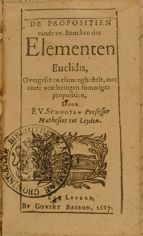 Titelblad van "Elementen van Euclides," 1617